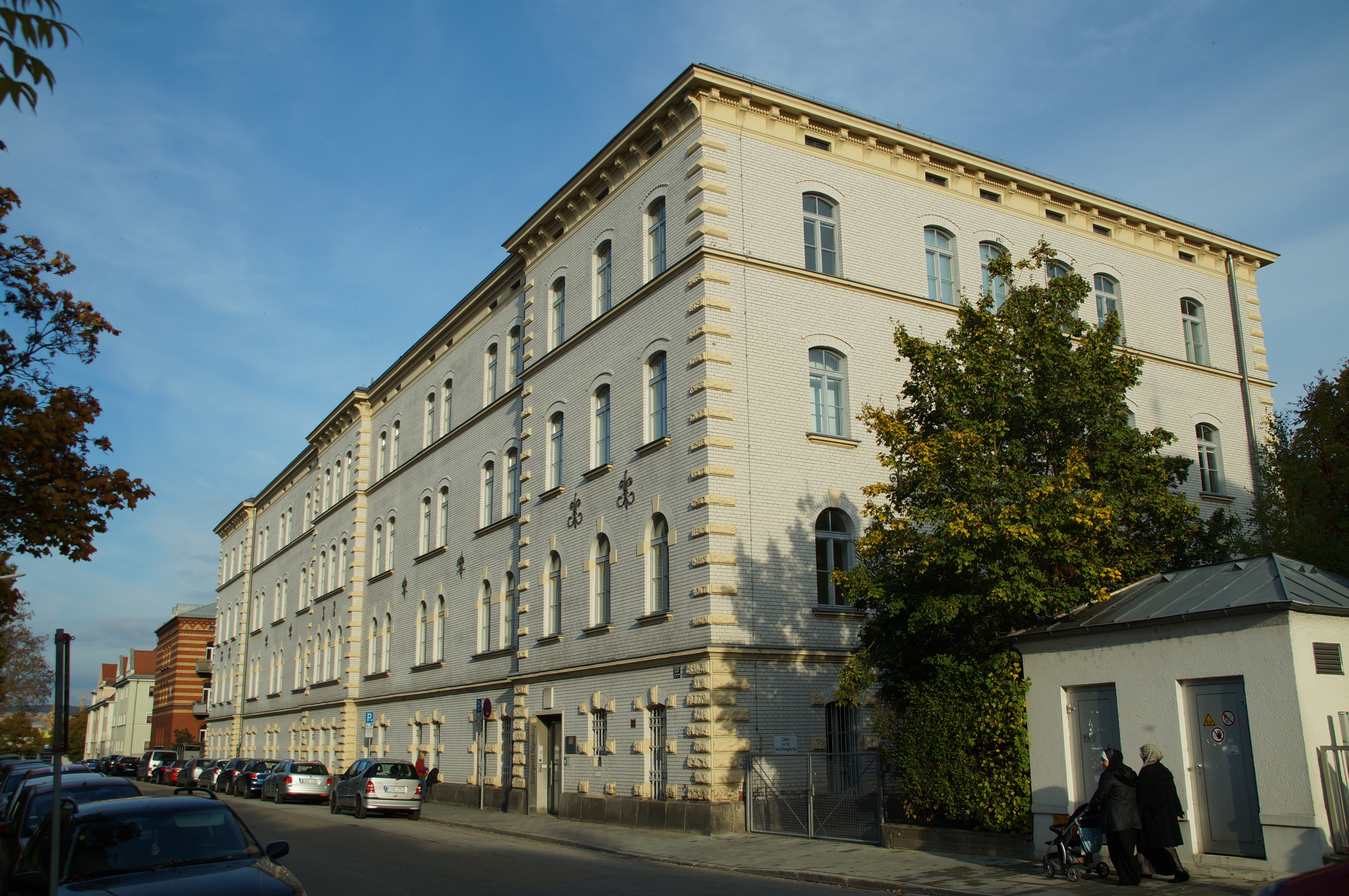 Neue Kasernen, Regensburg, Safflinger Straße 23, früher Halbbataillonskaserne, heute Sozialgericht